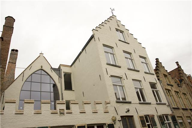 Trapgevel/Front Huis 't Schaep